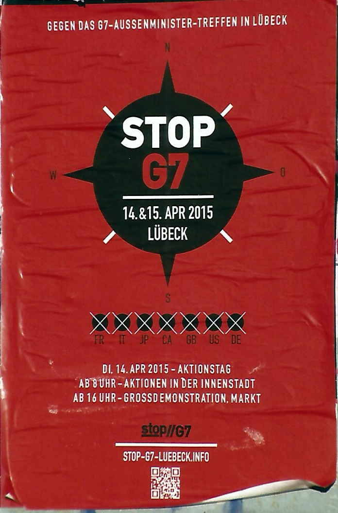 Plakat zur Demonstration gegen das G7-Treffen